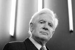 Der deutsche Komponist Arnold Maury (* 1927)